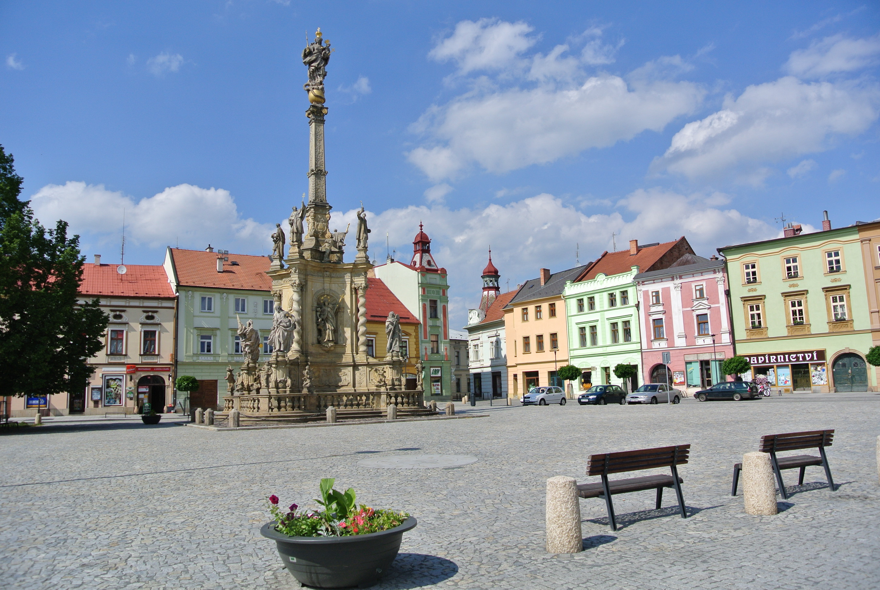 Sloup se sousoším - Mariánský sloup (Uničov), Masarykovo náměstí, Uničov